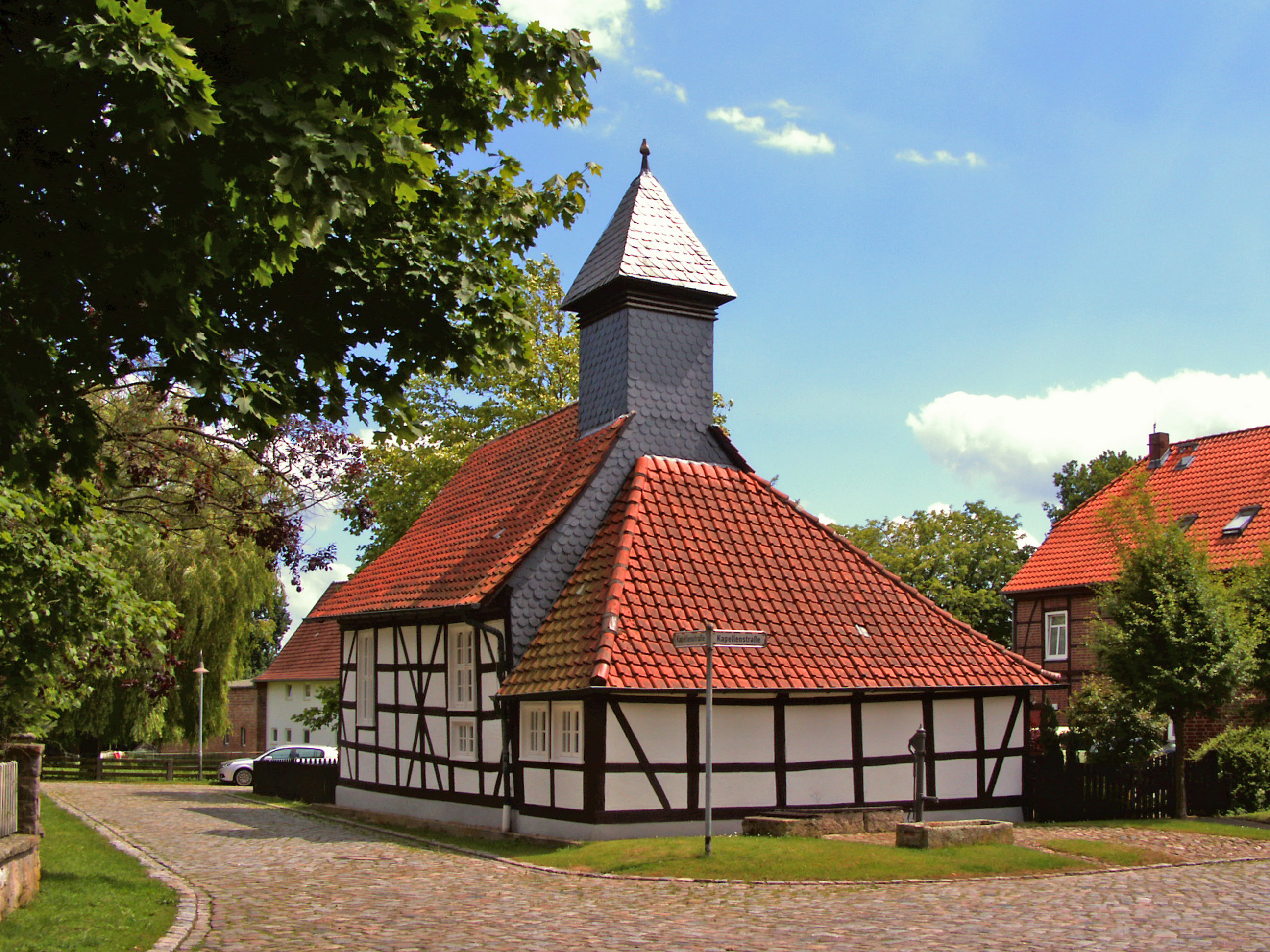 Evangelische Kapelle in Almke, Ortsteil von Wolfsburg